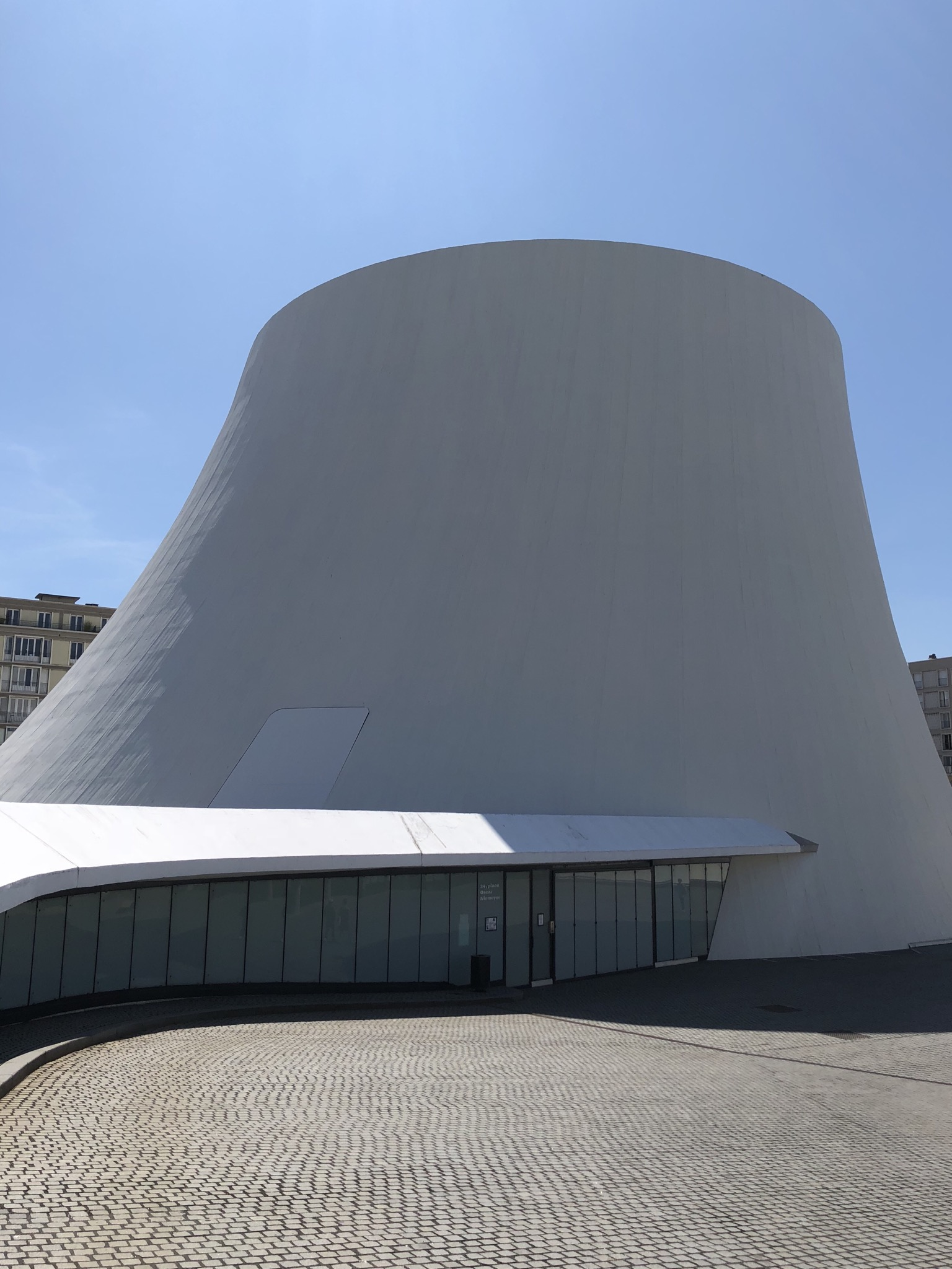 Kulturzentrum in Le Havre